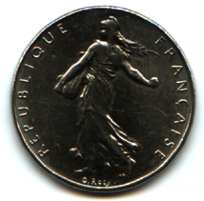 Piece 1 Franc 1999 Face 2